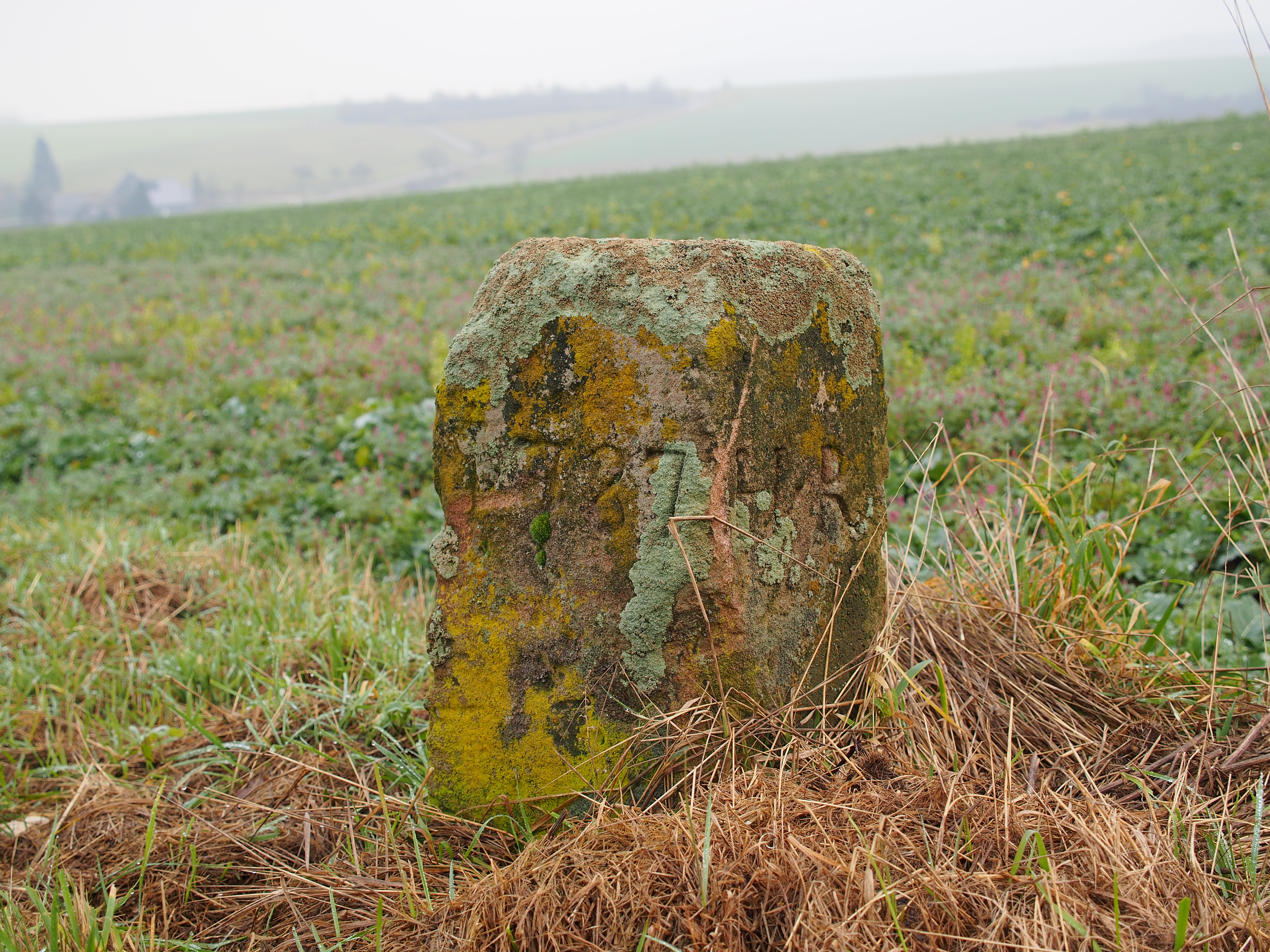 Grenzstein an der Straße zwischen Schwerbach und Sohrschied; Aufschrift: 1787 H/R